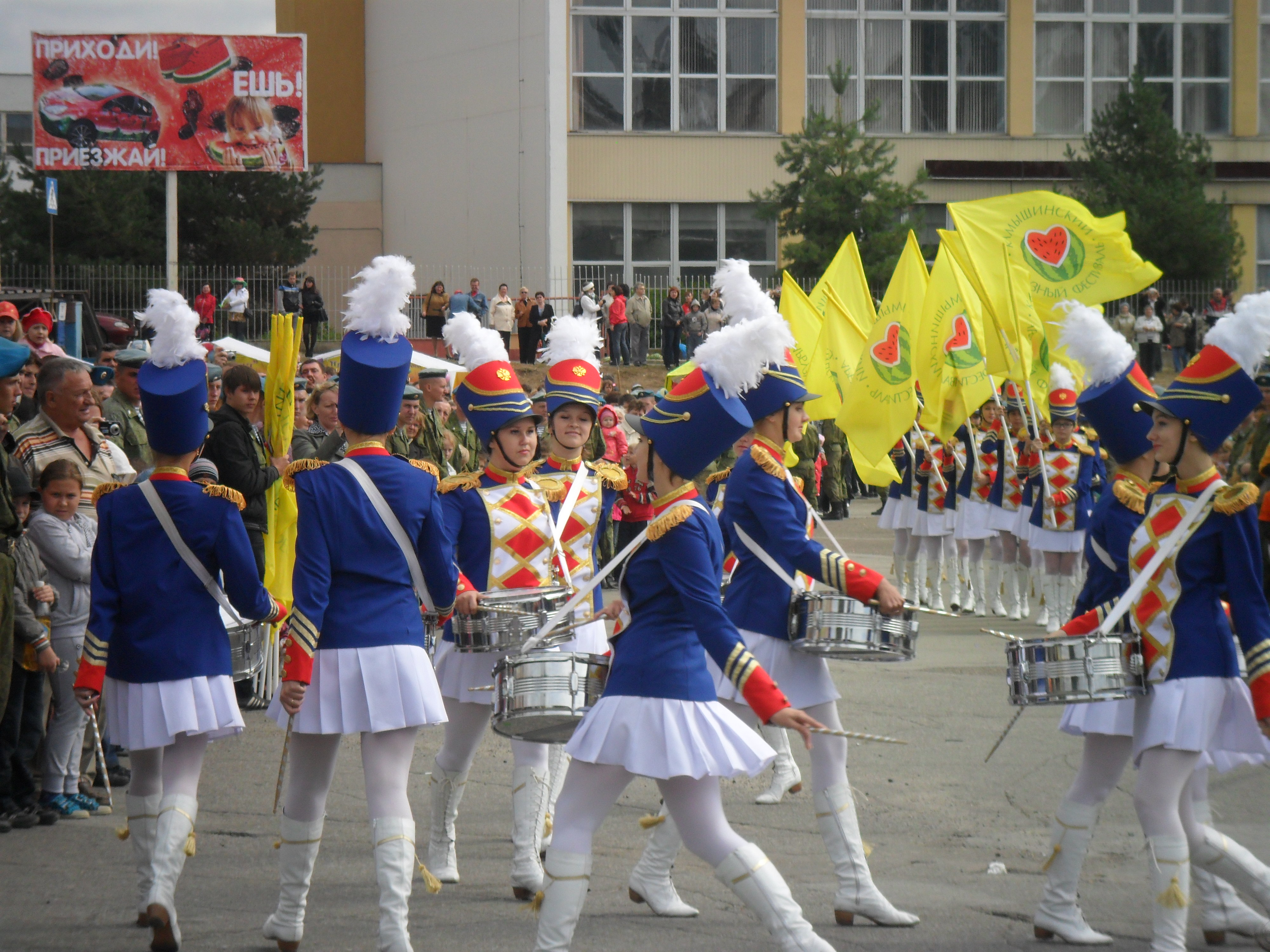 Выступление барабанщиц. Сделано на арбузном фестивале в Камышине. 2012 год.